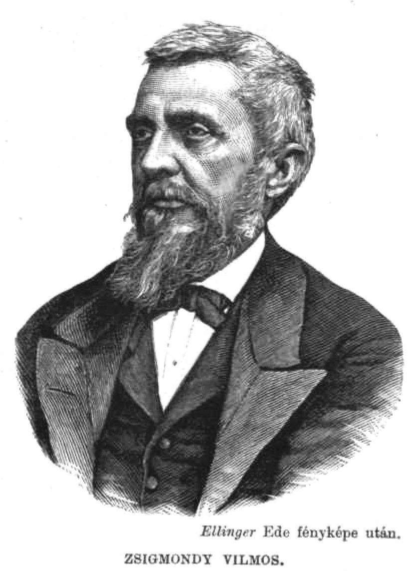 Zsigmondy Vilmos portréja. Ismeretlen művész metszete Ellinger Ede fényképe alapján